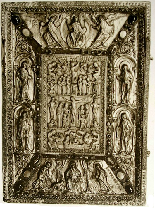 Tafel 24 von Georg Humanns „Die Kunstwerke der Münsterkirche zu Essen“: Buchdeckel des Theophanu-Evangeliars